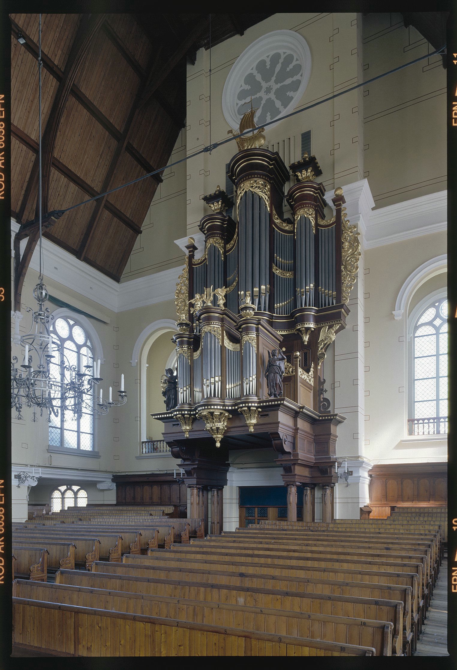 Hervormde Nieuwe kerk: Interieur, aanzicht orgel, orgelnummer 772 (opmerking: Gefotografeerd voor Het Historische Orgel in Nederland 1819-1840, bladzijde 113)